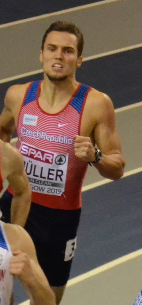 Mens 400m